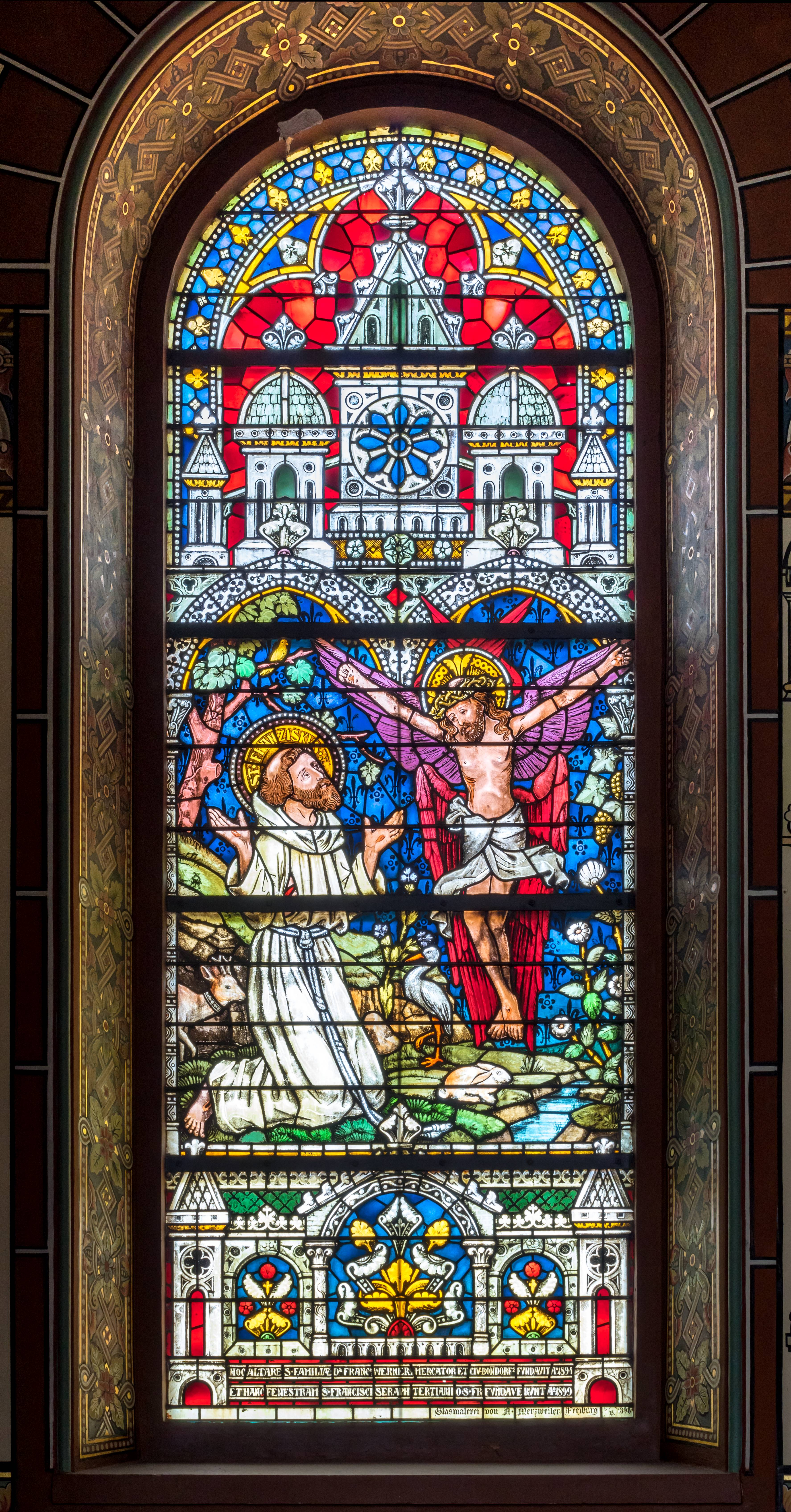 Glasfenster im Langhaus in der Kirche St. Peter und Paul in Bonndorf HOC ALTARE S FAMILIAE Ds FRANCs WERNER MERCATOR ET CIV BONNDORFs FVNDAVIT A° 1894 ET HANC FENESTRAM S FRANCISCI SERAPH TERTIARII O S FR FVNDAVERUNT A° 1899 Glasmalerei von A. Merzweiler Freiburg i. B. 1898 [